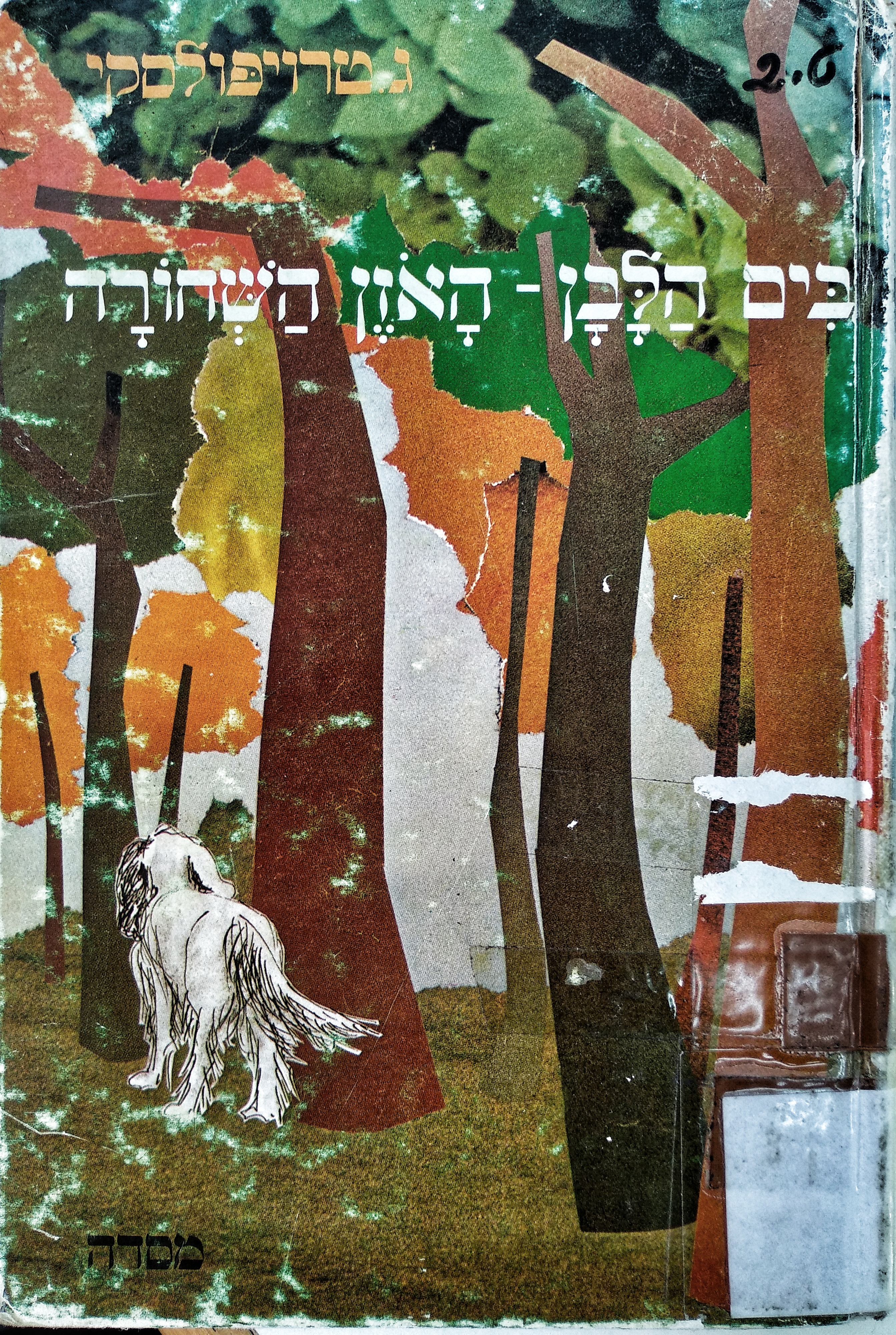 תמונה של כריכת הספר שמצאתי בספרייה וצילמתי